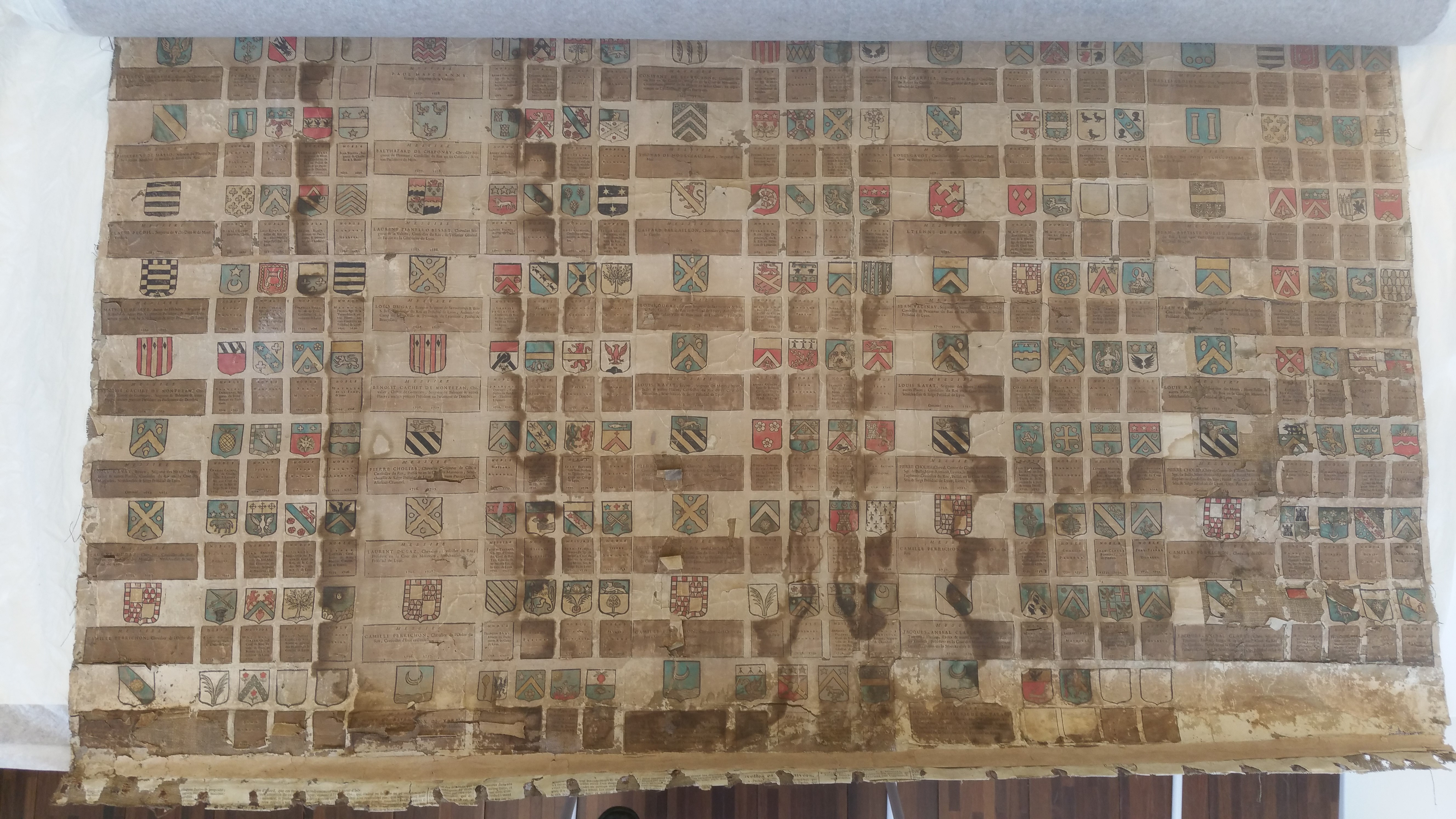 Archives du département du Rhône et de la métropole de Lyon, fonds Bottu de la Barmondière, 56 J 375.